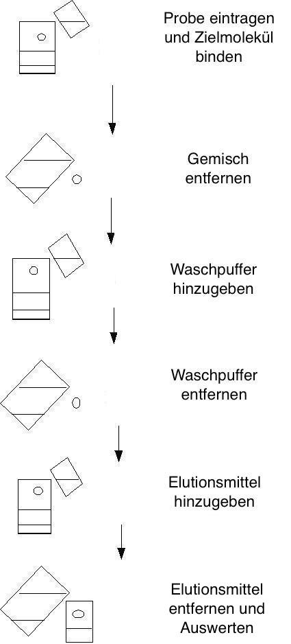 Affinitäschromatographie Diagramm